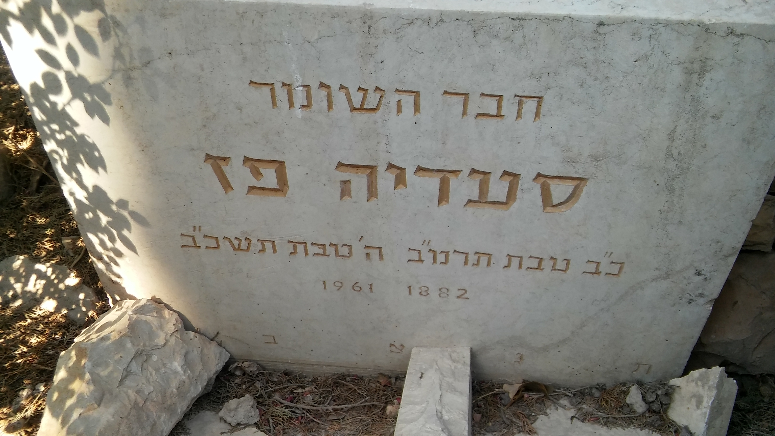 קברו של סעדיה פז בחלקת השומר בבית הקברות של כפר גלעדי